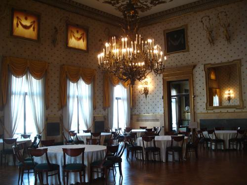 Una delle sale al Piano Nobile del Caffé Pedrocchi, Padova